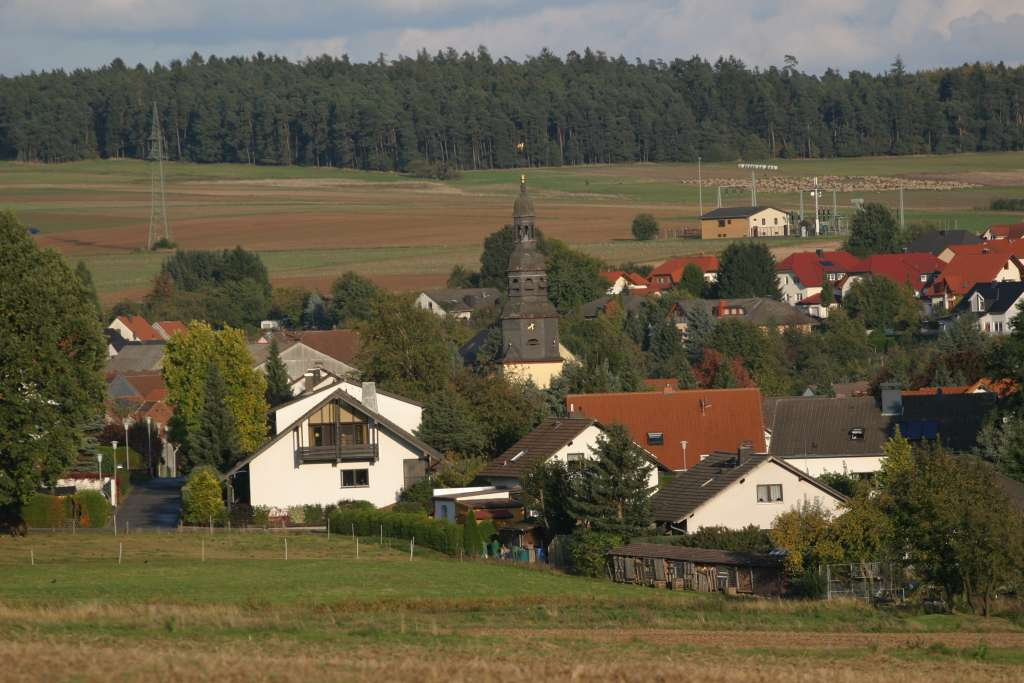 Stadtallendorf: Ländlich geprägter alter Stadtkern ("Altes Dorf") mit Kirche St. Katharina.